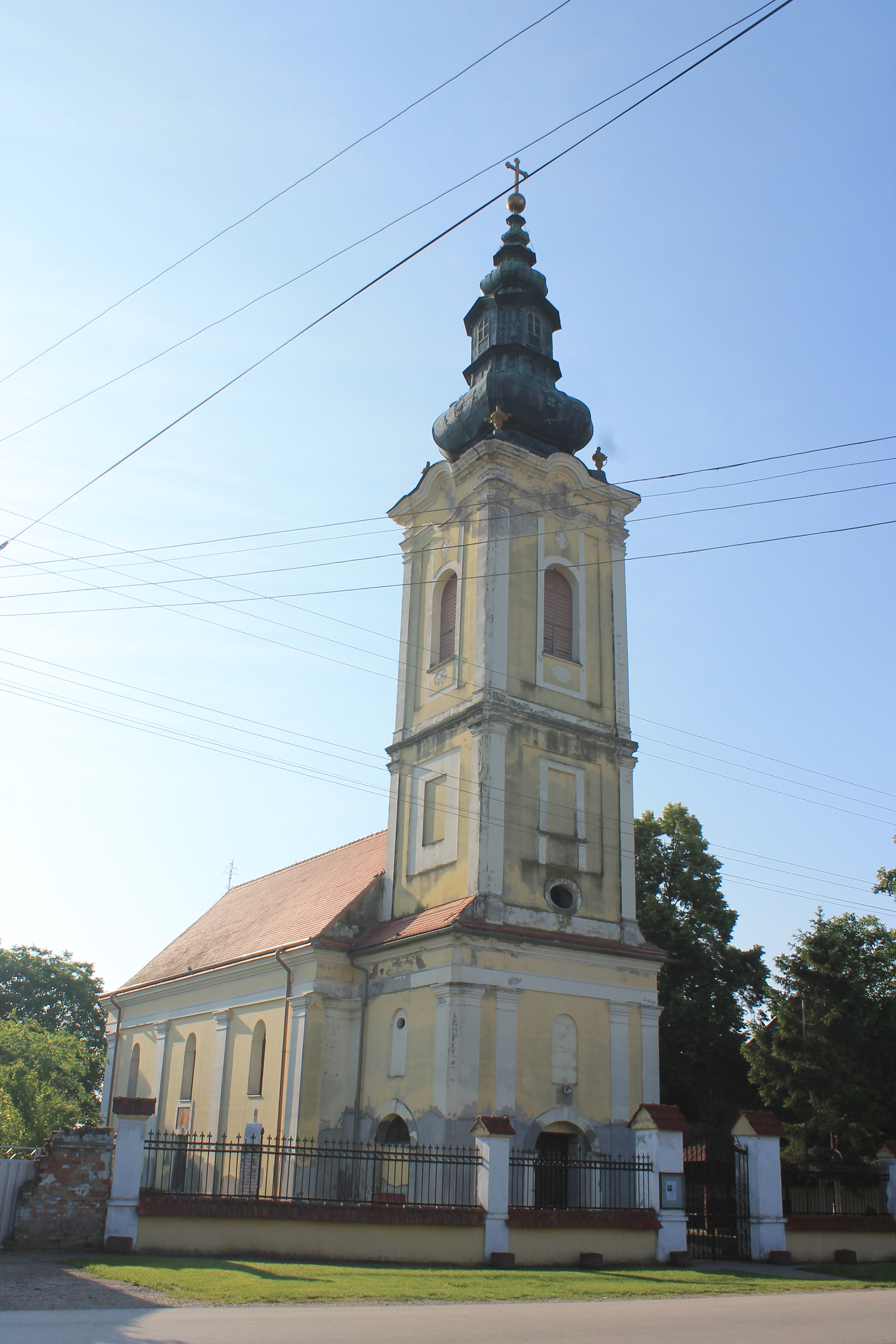 Crkva Sv. Nikole (Martinci)